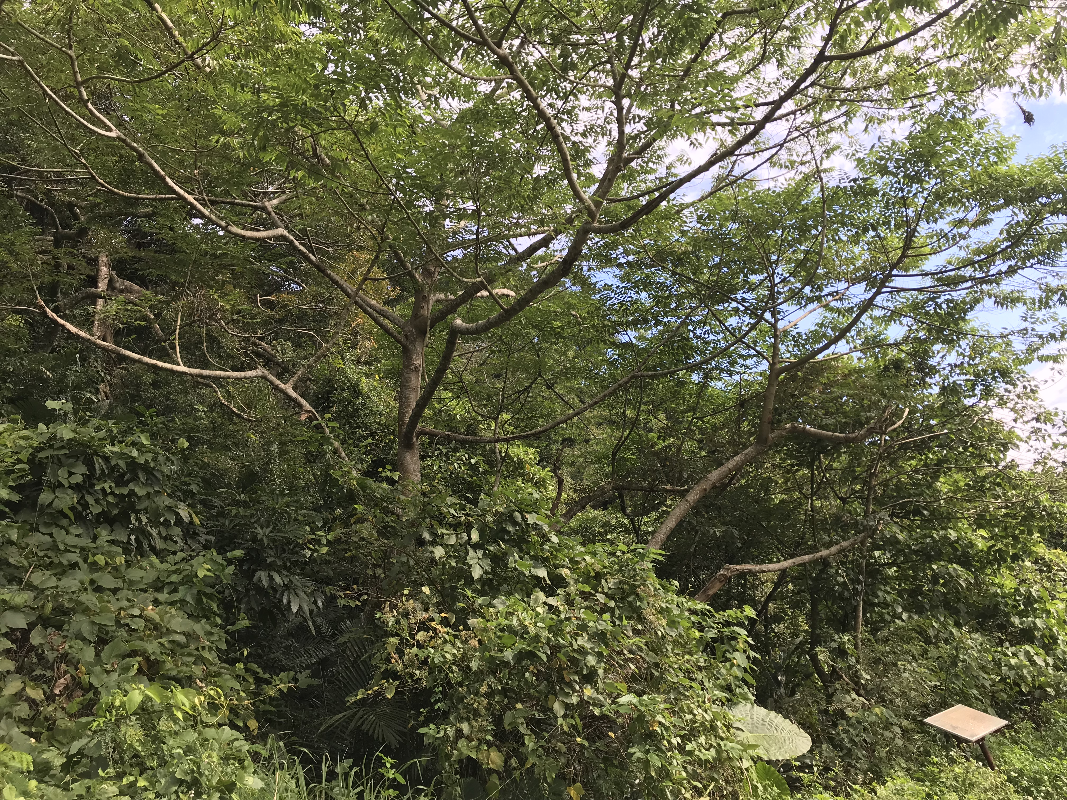 臺灣臺東縣卑南鄉斑鳩魚池白榕